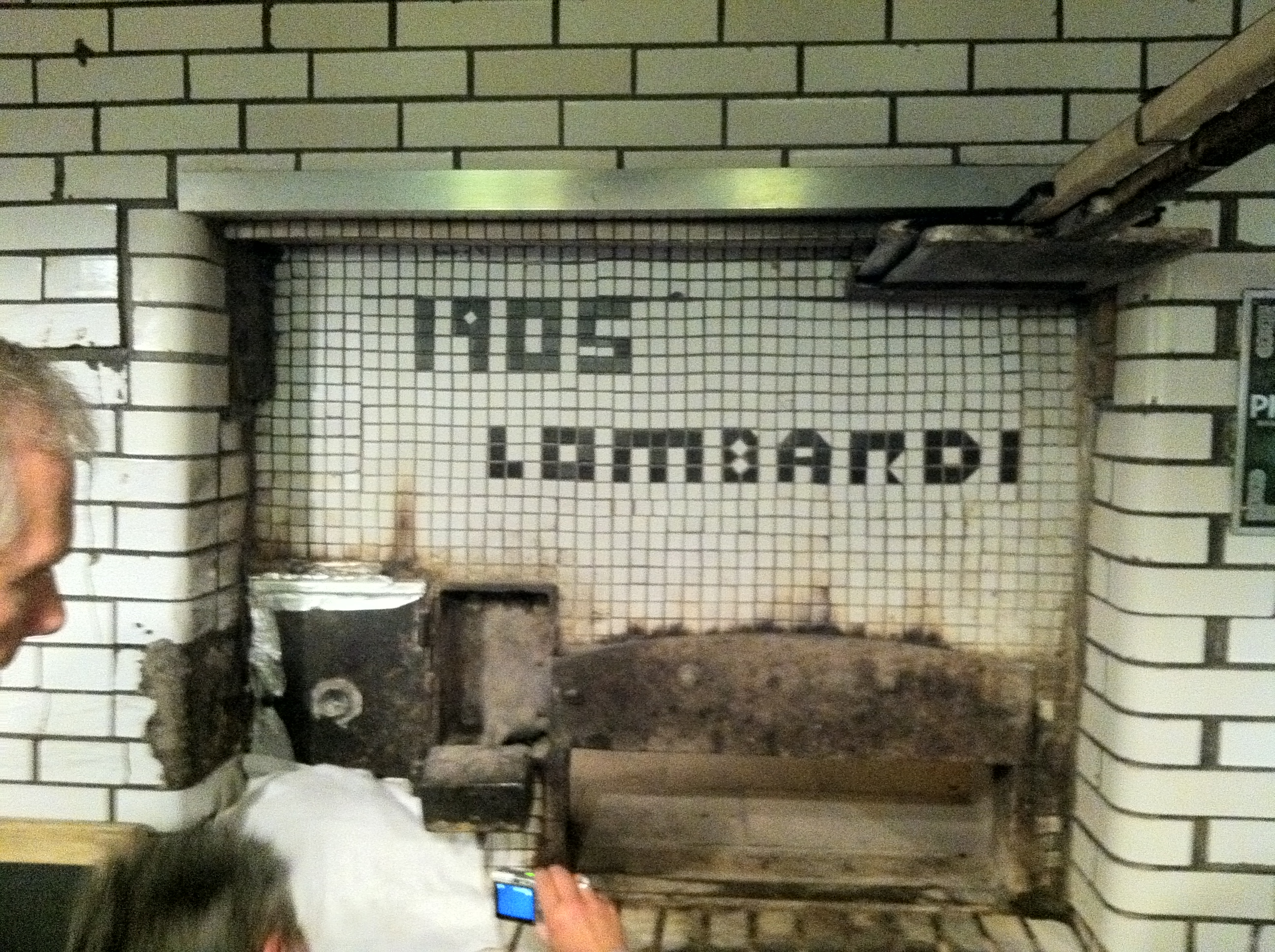 A coal-fired pizza oven at Lombardi's in Manhattan